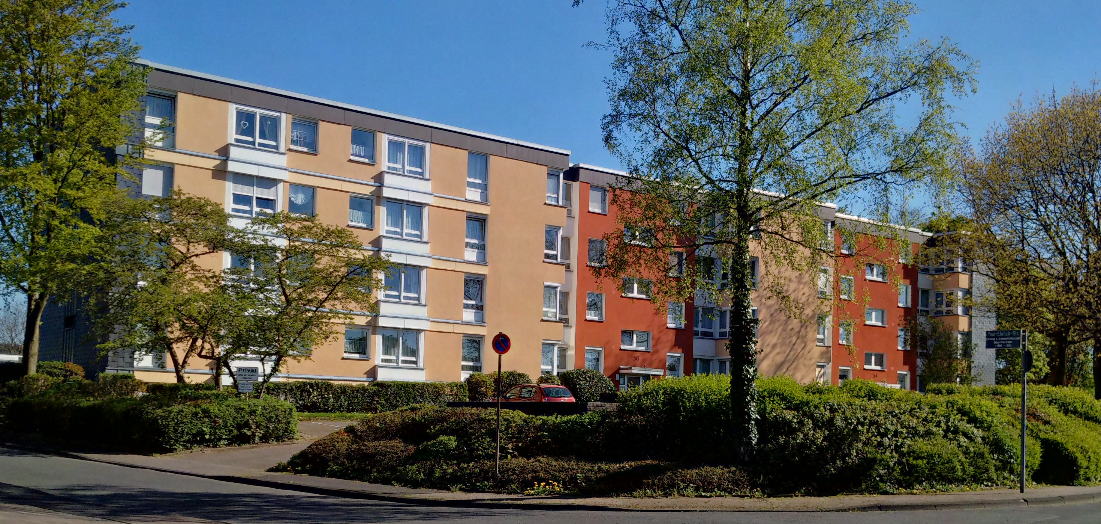 Häuser in der Wohnsiedlung Kannenhof, Alfred-Nobel-Straße, in Solingen, aufgenommen im Frühling 2016